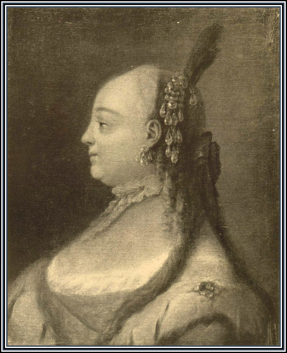 Жан-Луи де Велли (Jean-Louis de Velly) (ок. 1730 – 1809) Портрет императрицы Елизаветы Петровны 1750-е гг. Холст, масло Местонахождение неизвестно. В нач. XX в. находился в собрании Пажеского корпуса, в С.-Петербурге. Воспр.: Н. Врангель. Иностранцы в России. // Старые годы. 1911, июль-сентябрь. С. между 10 и 11. Таврическая выставка 1905 г., № 381.